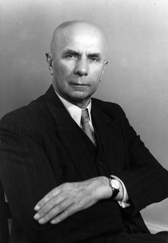 Jakob Kaiser, Bundesminister für gesamtdeutsche Fragen, 1949-1957 Foto Bundesbildstelle Bonn